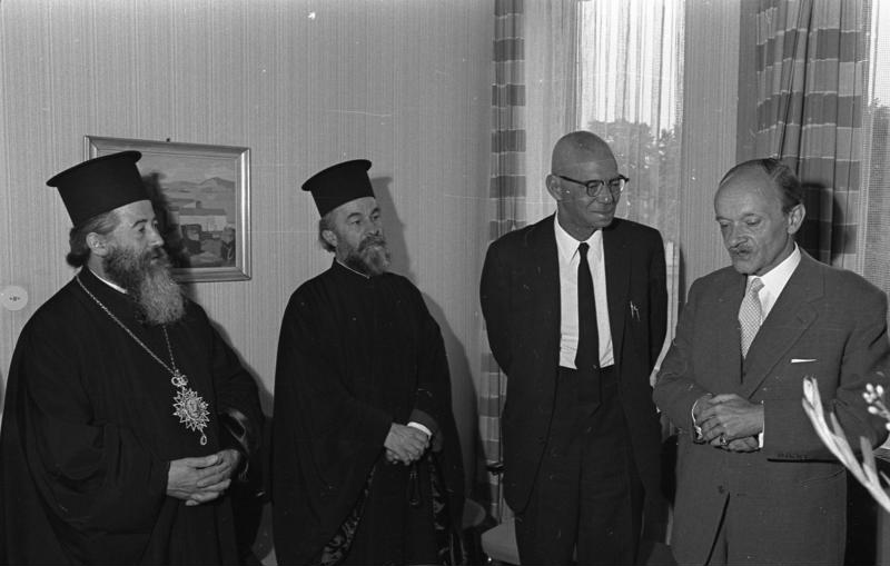 Ökumenische Persönlichkeiten Empfang durch Staatssekretär von Eckardt im Bundespresseamt